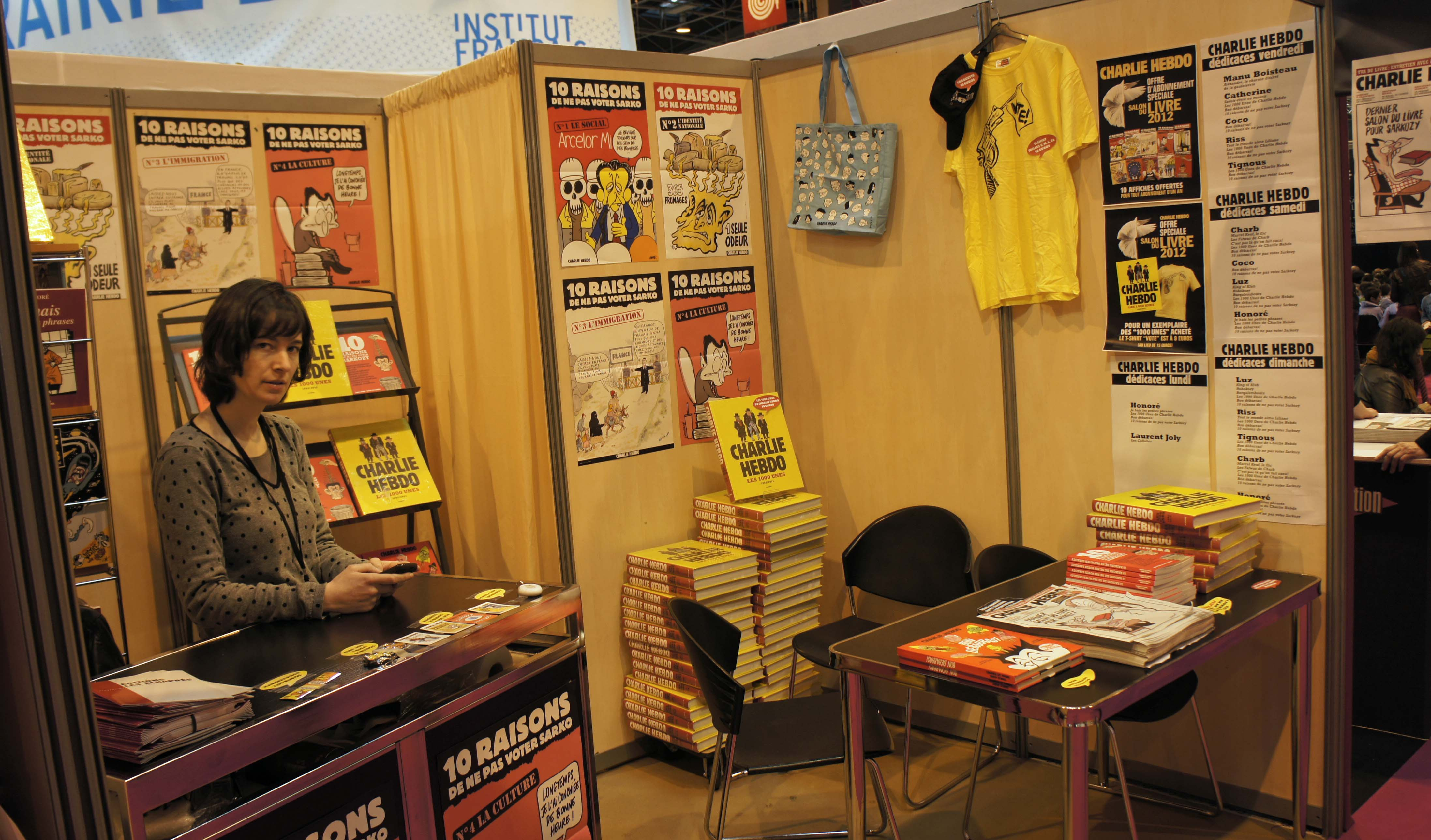 Stand Charlie Hebdo salon du livre 2012 à Paris.